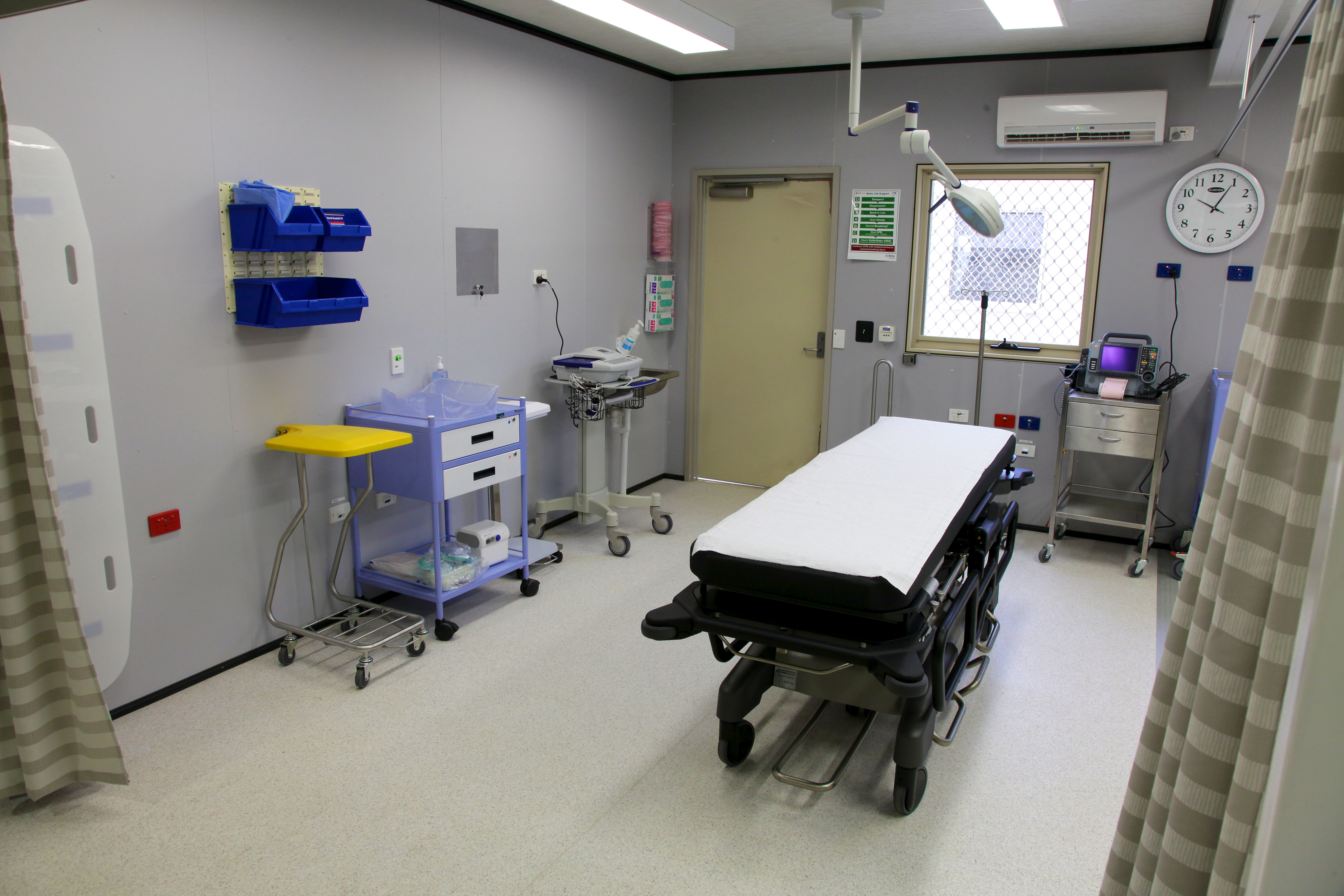 Medical facilities